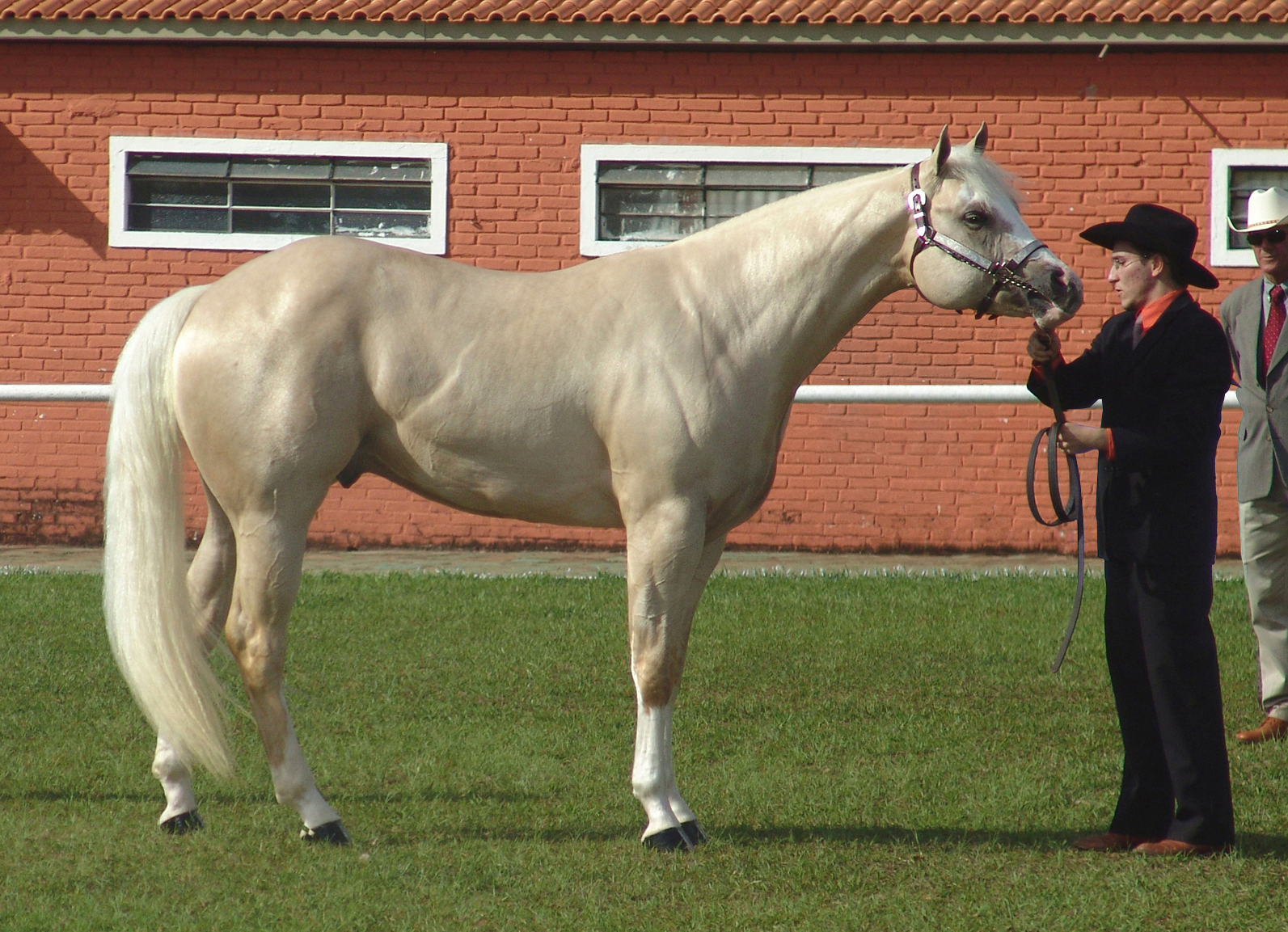 Cavalo da raça Quarto de milha (Quarter Horse) em exposição na EMAPA, Avaré- São Paulo, Brasil